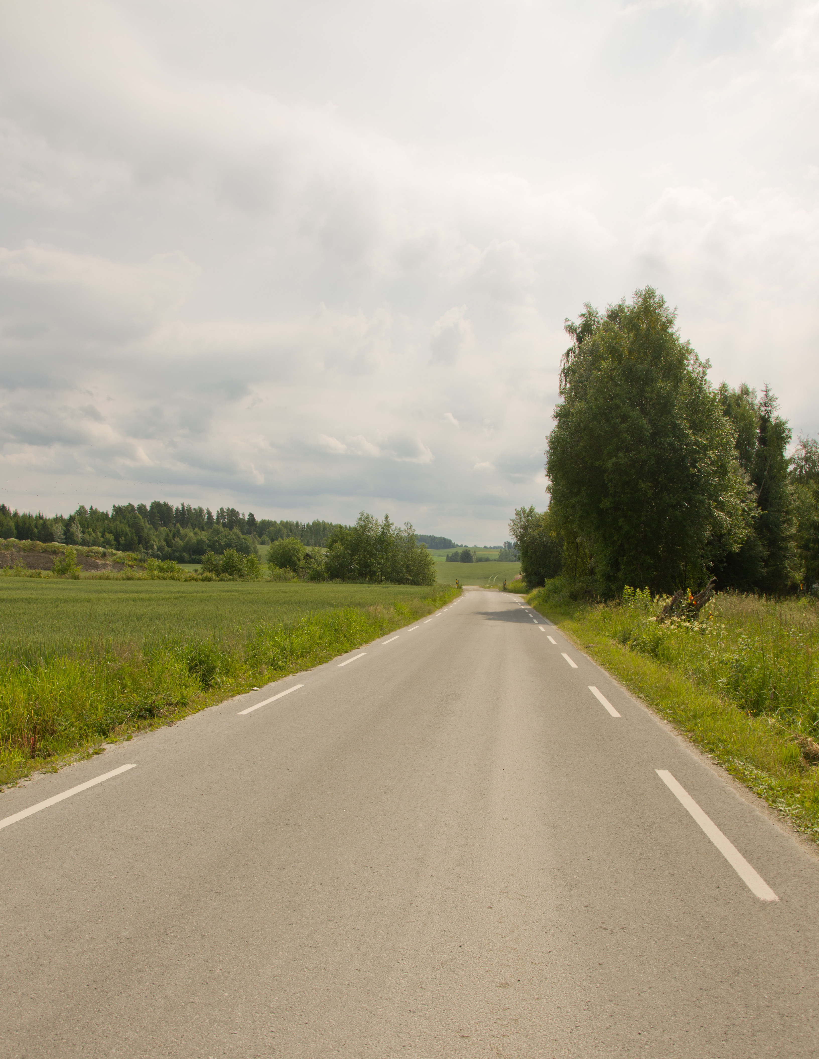 Fylkesvei 1792 (tidl. 101) Imerslundvegen